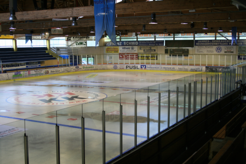 Kunsteisstadion Miesbach; Blick aufs Eis von Sitzplatztribüne